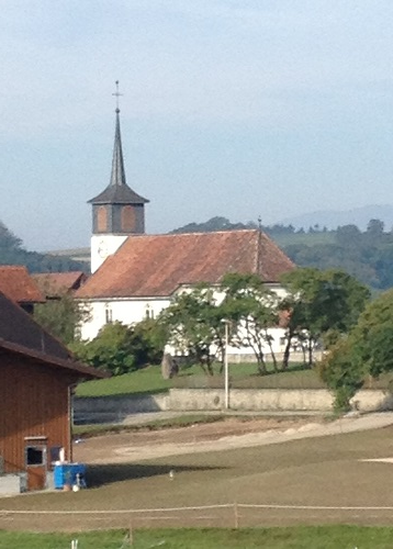 L'église Saint-Jacques de Nuvilly dans le canton de Fribourg en Suisse.